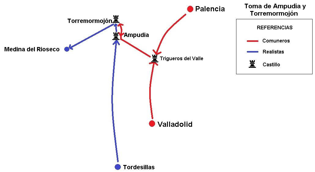 Mapa de los movimientos comuneros y realistas en la toma de Ampudia y Torremormojón